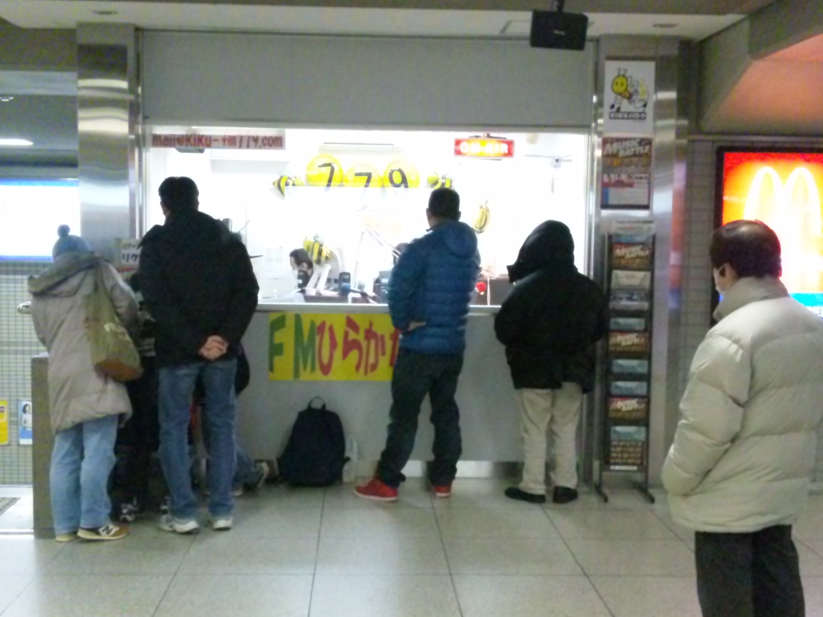 京阪本線枚方市駅にあるエフエムひらかたエキナカスタジオの様子。投稿者本人による撮影。